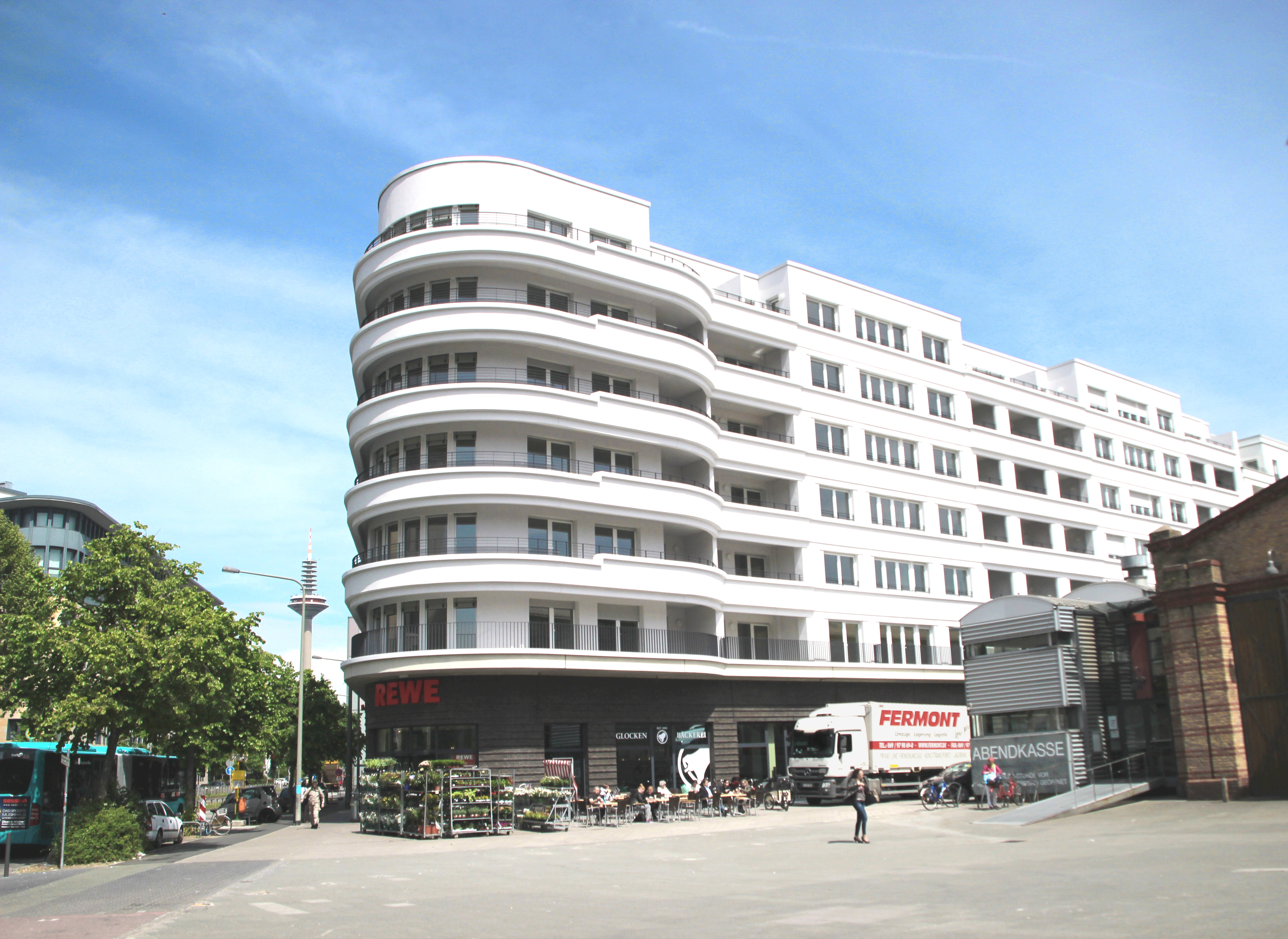 Bildinhalt: Gebäudekomplex "Wohnen am Depot" vom Carlo-Schmid-Platz aus gesehen. Im Erdgeschoss ein Lebensmittelmarkt, darüber Wohnungen. Links im Hintergrund der Europaturm. Rechts im Vordergrund die Abendkasse des Bockenheimer Depots. Aufnahmeort: Frankfurt am Main, Deutschland